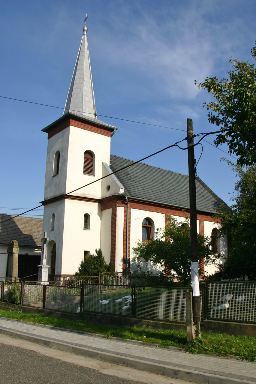 Miłowice (dodatkowa nazwa w j. niem. Mühlsdorf) – wieś w Polsce położona w województwie opolskim, w powiecie prudnickim, w gminie Biała.